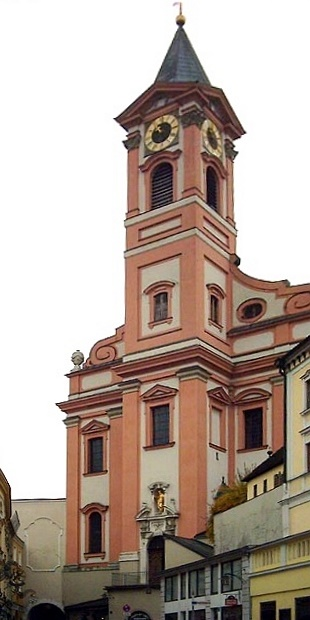 Passau (Niederbayern): Pfarrkirche St. Paul Bildautor: Peter Bubenik - Aufnahmedatum: 01.11.2004 - Lizenz: GNU-FDL Kategorie:Bild:Kirche